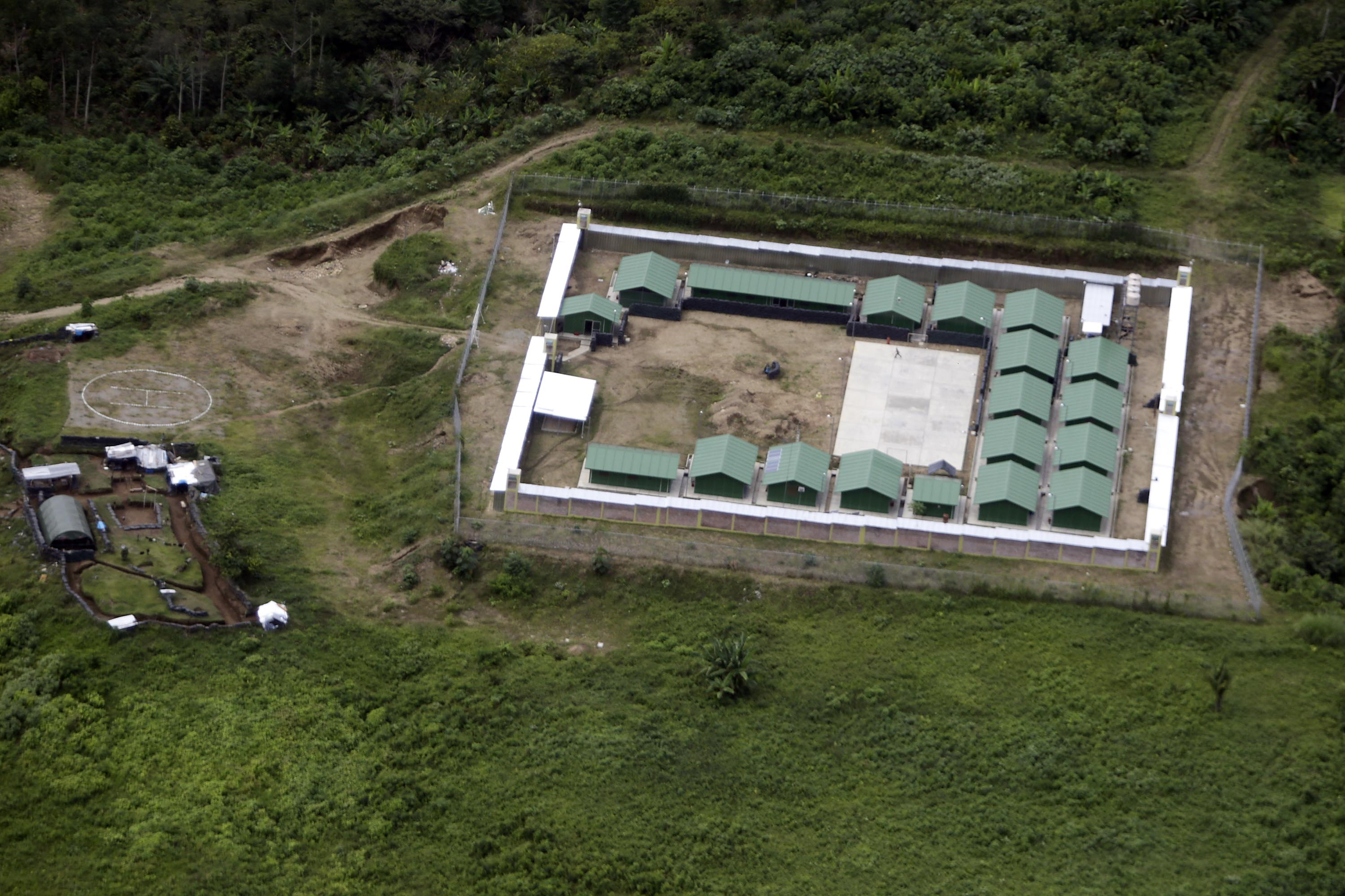 El ministro de Defensa, Pedro Cateriano Bellido, cumplió una visita de inspección a las bases contraterroristas ubicadas en el Valle de los Ríos Apurímac, Ene y Mantaro (VRAEM) donde comprobó las condiciones óptimas en que se desempeñan nuestros soldados. Acompañado del comandante general del Ejército, General Ronald Hurtado Jiménez, el titular del sector arribó a las bases de Mazamari, Pichari e Incahuasi, en las regiones Junín y Cusco. En Incahuasi, el ministro verificó las nuevas instalaciones y el correcto desempeño del personal asignado en esta base militar, desde donde se logrará control territorial en la zona. También se supervisaron las operaciones militares que se realizan en Mazángaro y Unión Mantaro, puntos claves en el VRAEM y rutas de tránsito del narcotráfico. El ministro Cateriano anunció que el gobierno reforzará la estrategia contraterrorista con importantes adquisiciones. “A fines de este año llegarán ocho nuevos helicópteros para servir en esta zona. Se trata de una geografía agreste donde el principal vehículo de transporte es el helicóptero, y las Fuerzas Armadas lo requieren”, mencionó. Finalmente, adelantó que el gobierno construirá cuatro nuevas bases contraterroristas y la Fuerza Aérea adquirirá seis radares, destinados a reforzar la lucha contra el terrorismo, narcotráfico y otras amenazas.